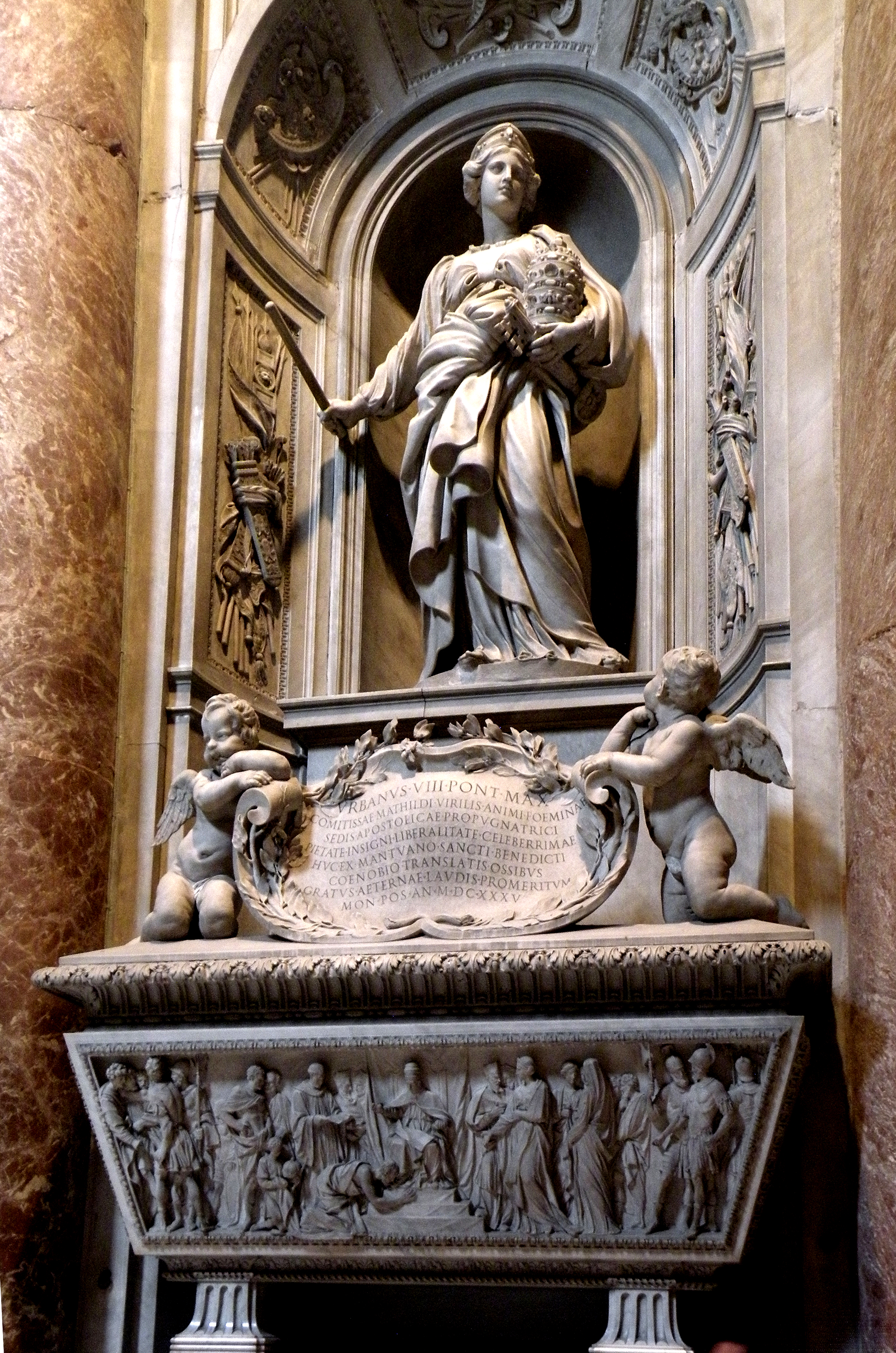 Гробница Матильда Тосканская